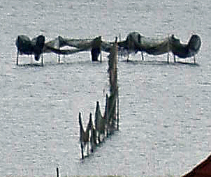 'Dansk: Bundgarnsanlæg i Louns Fjord, Limfjorden, Denmark